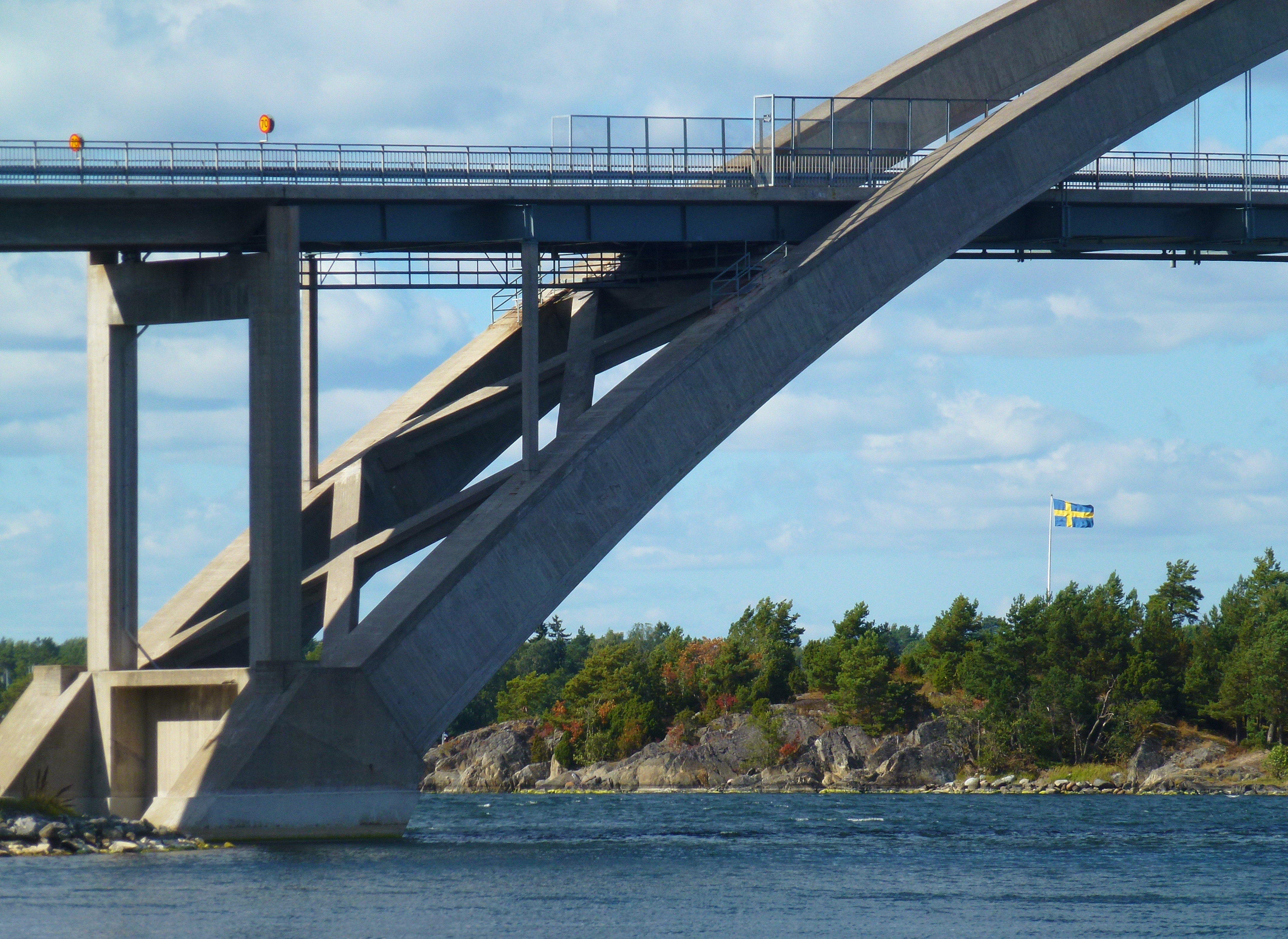 Djuröbron